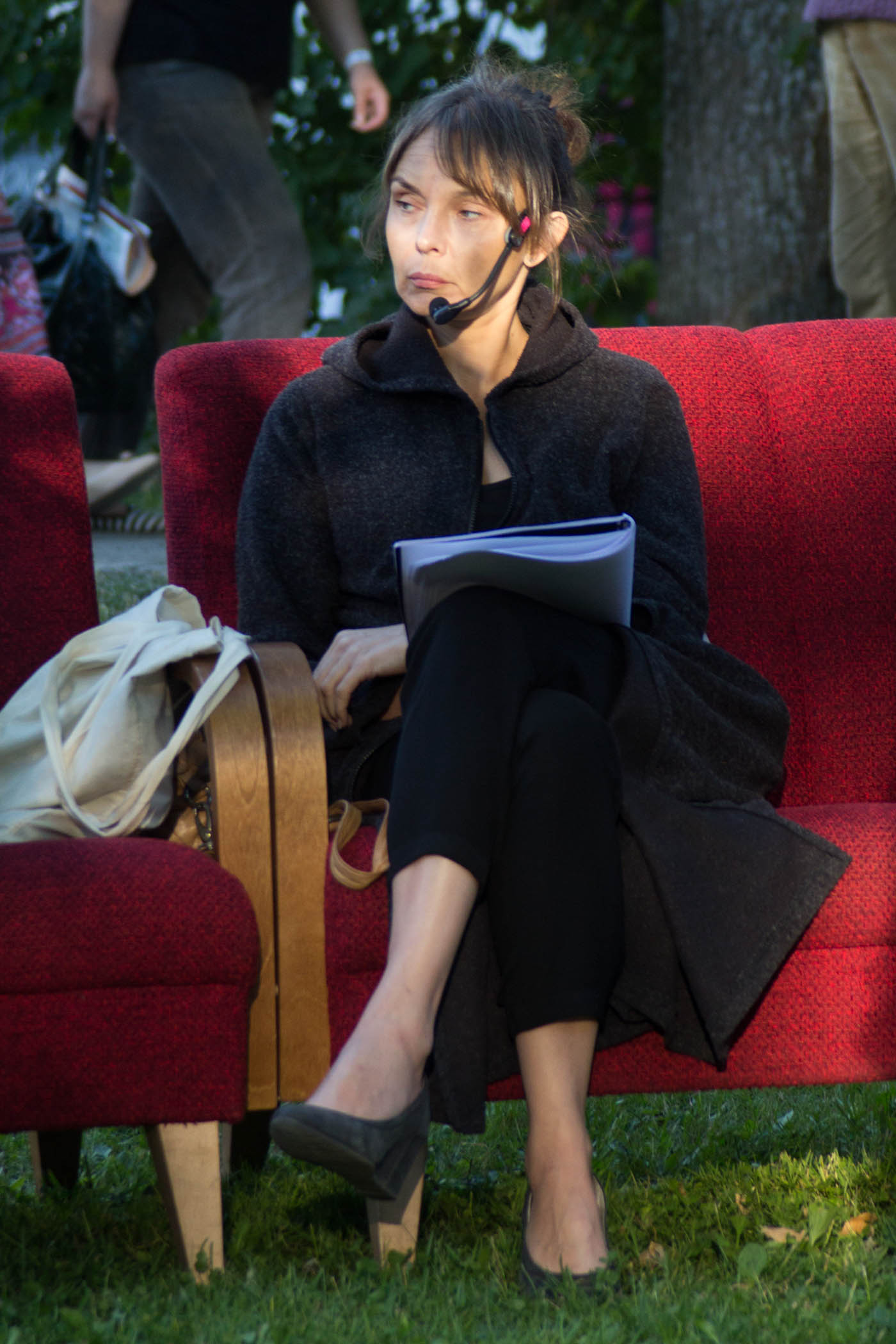 Elina Reinold Arvamusfestivalil Ekspress Meedia alal.